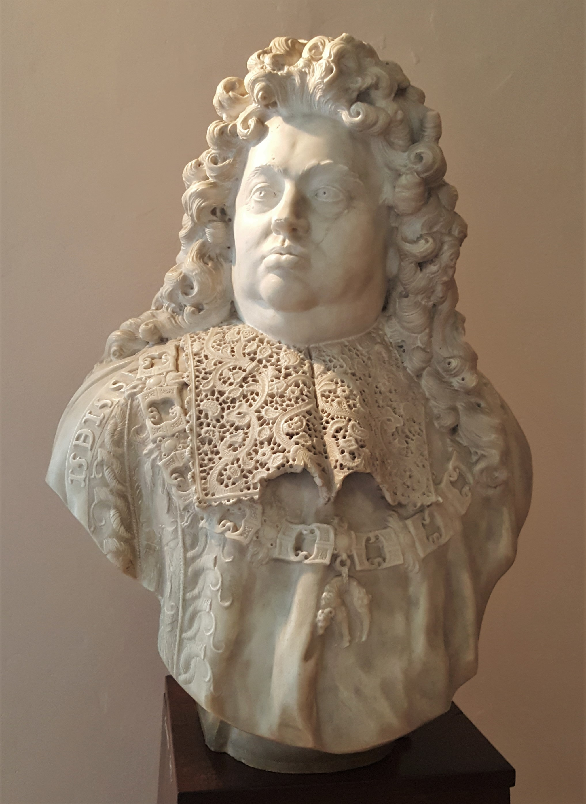 Marmorová busta Dominika Ondřeje Kounice - Jan Bloemmendael (1698), zámek Slavkov